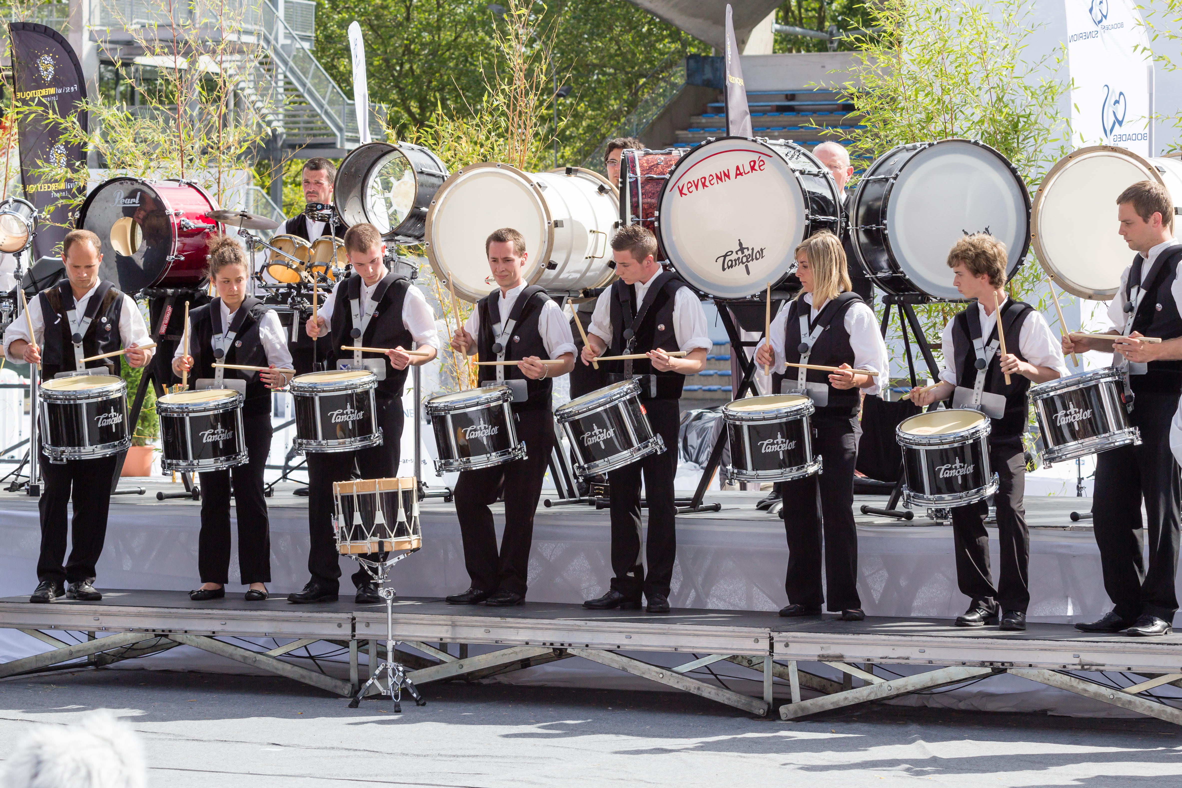 La kerlenn Alré lors du championnat national des bagadoù (première catégorie) au FIL 2012.